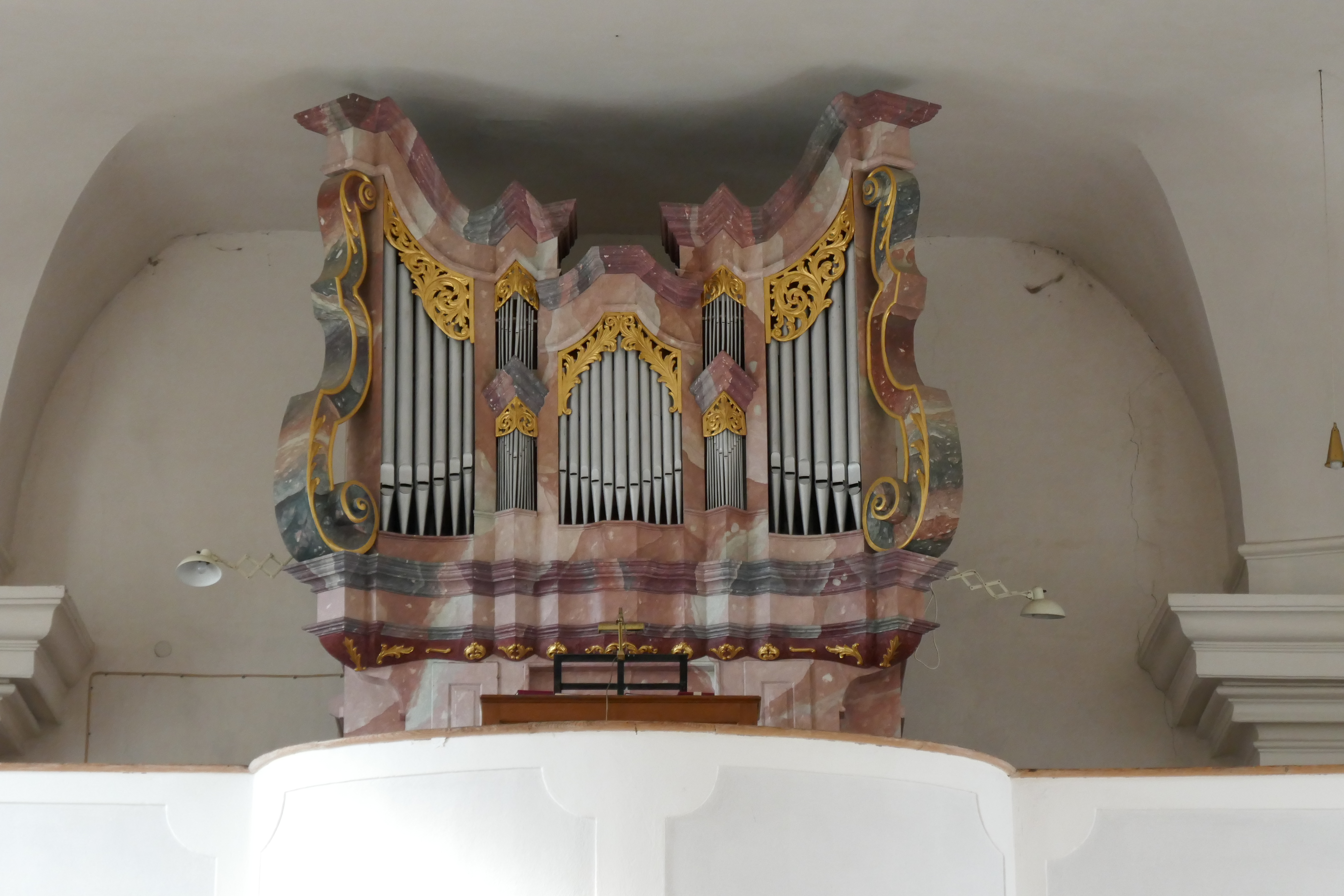 Weiss-Gehäuse